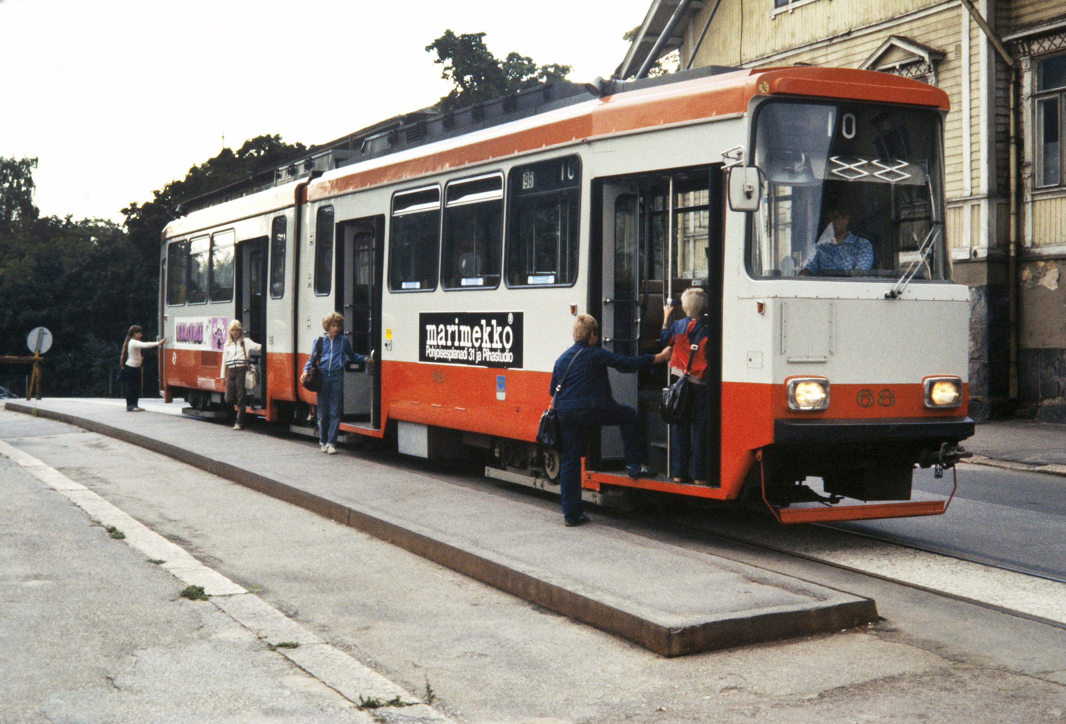 Liikennelaitoksen raitiovaunu Ensi linjalla.